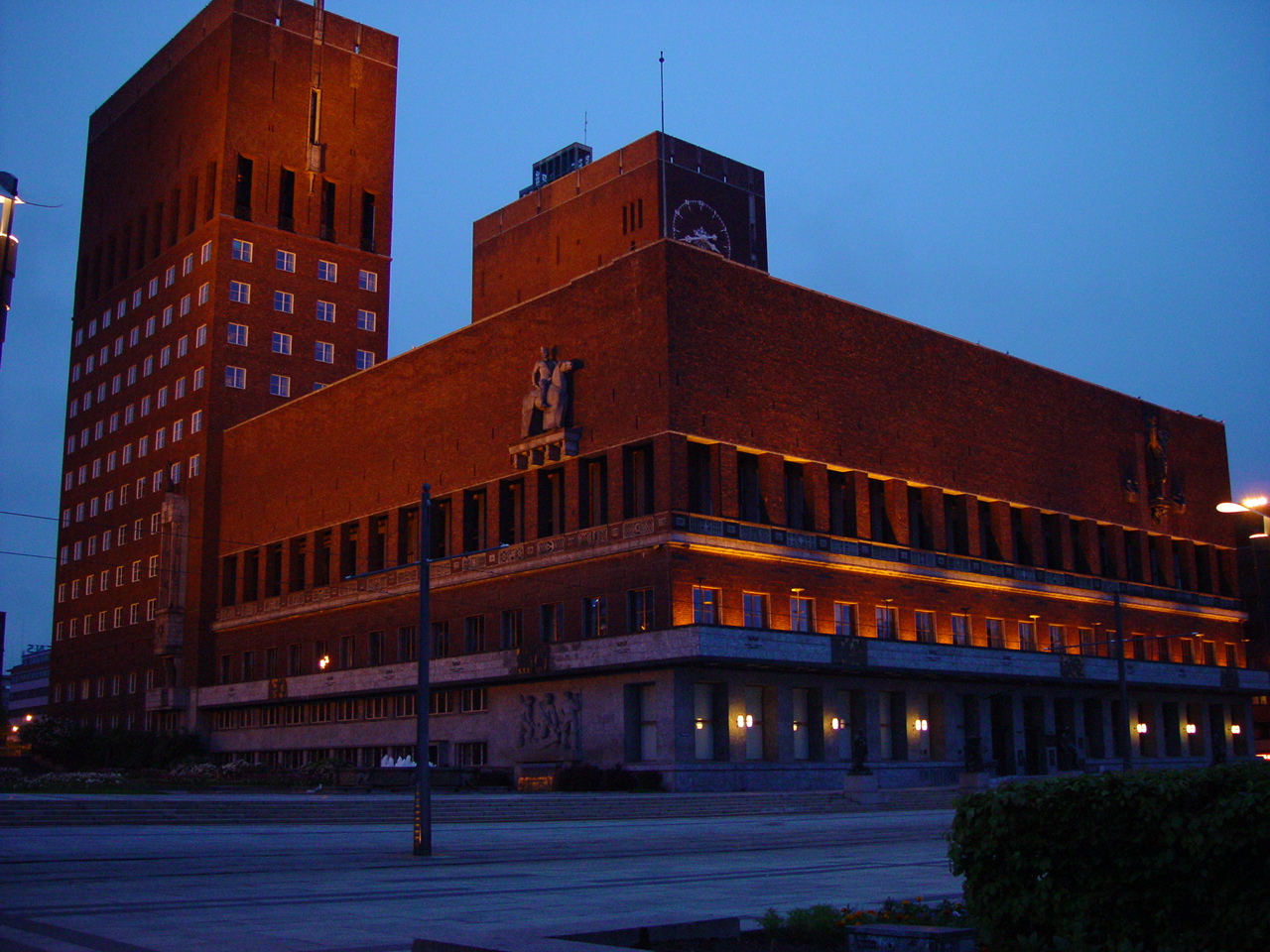 Oslo rådhus